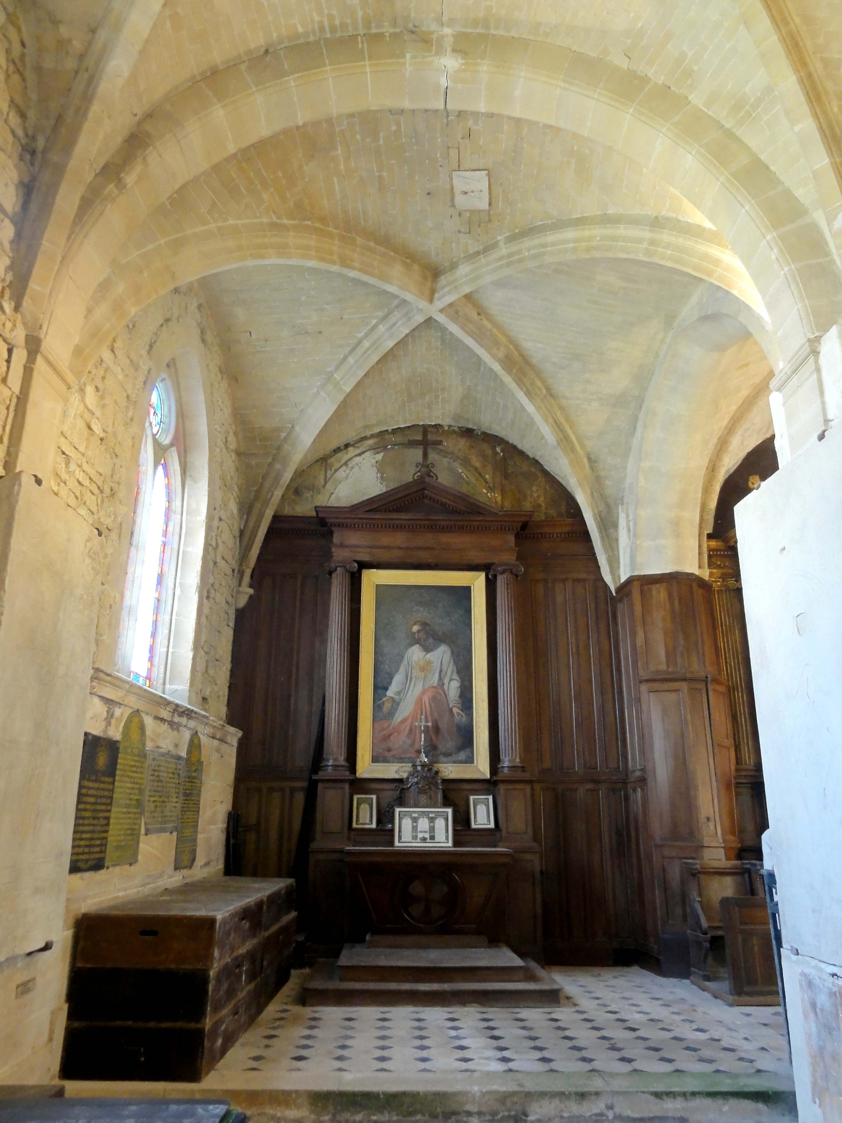 Intérieur de l'église (voir titre).